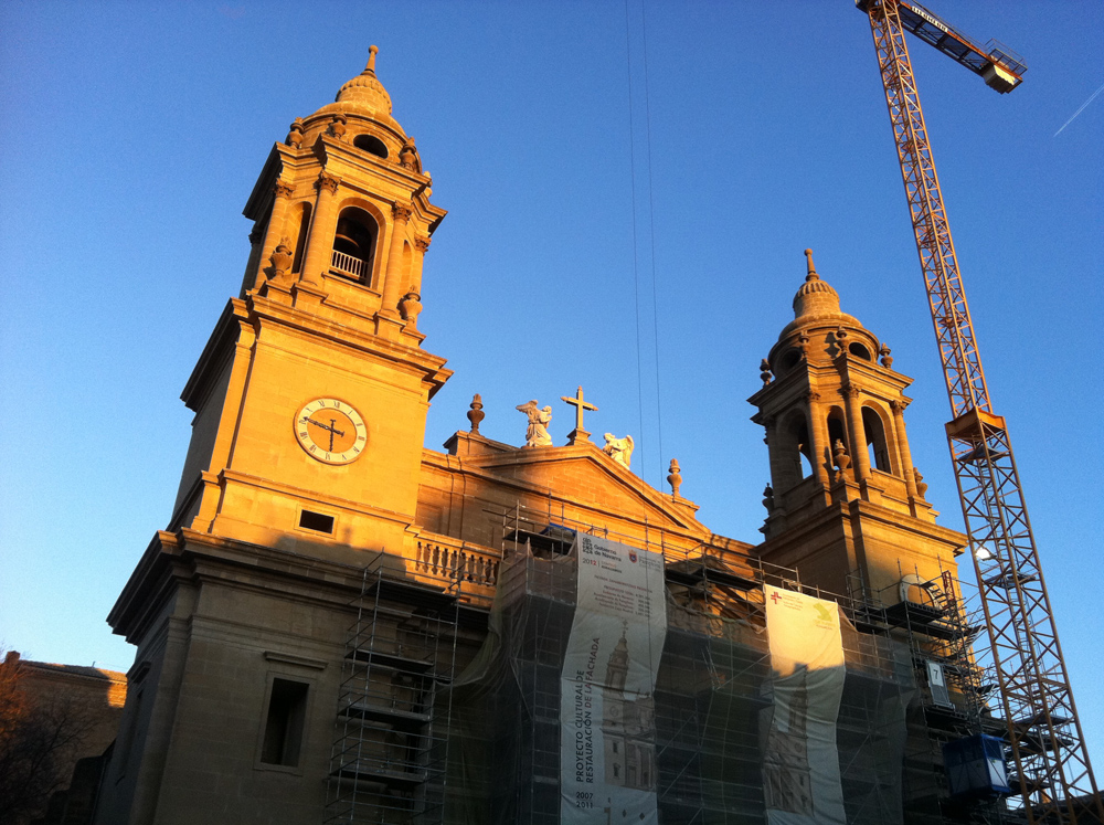 Fachada neoclasica de Ventura Rodriguez de la catedral de Pamplona terminando el proceso de restauracion